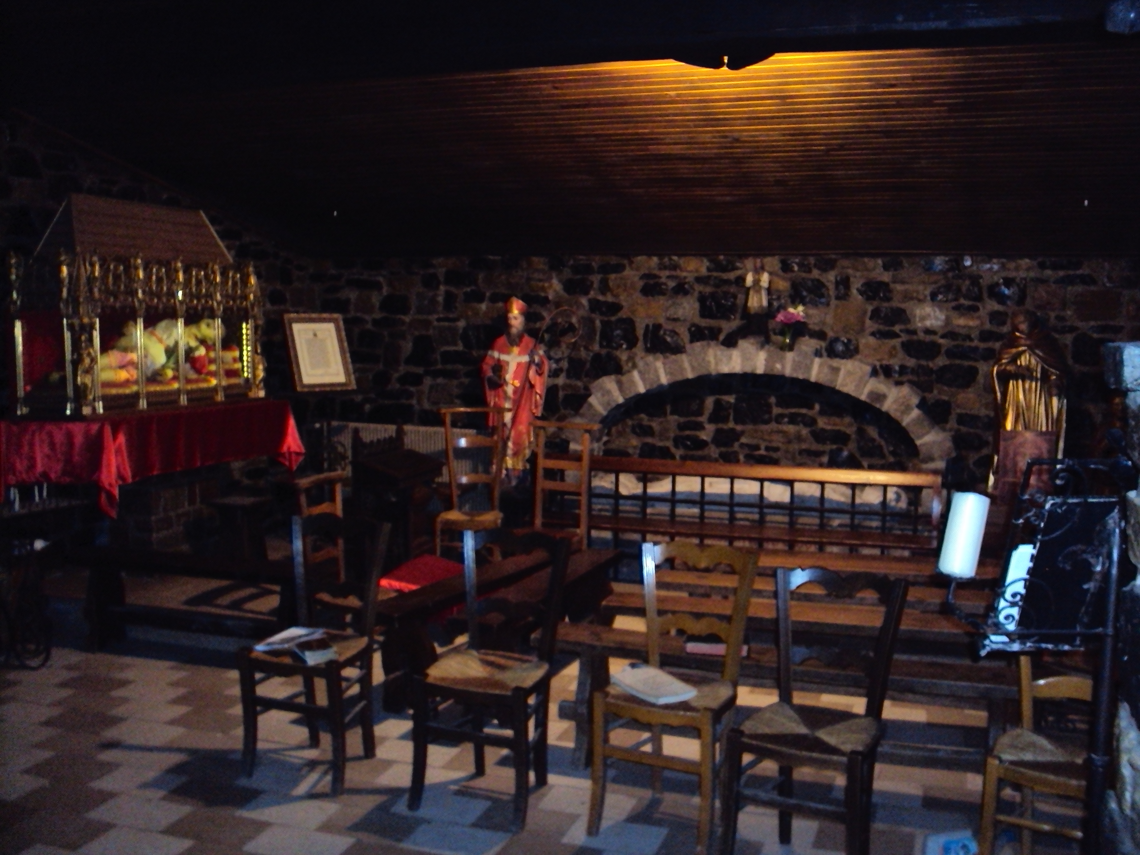 Extrémité droite du transept de la chapelle du monastère de la Sainte-Croix de Riaumont à Liévin (Pas-de-Calais, France).